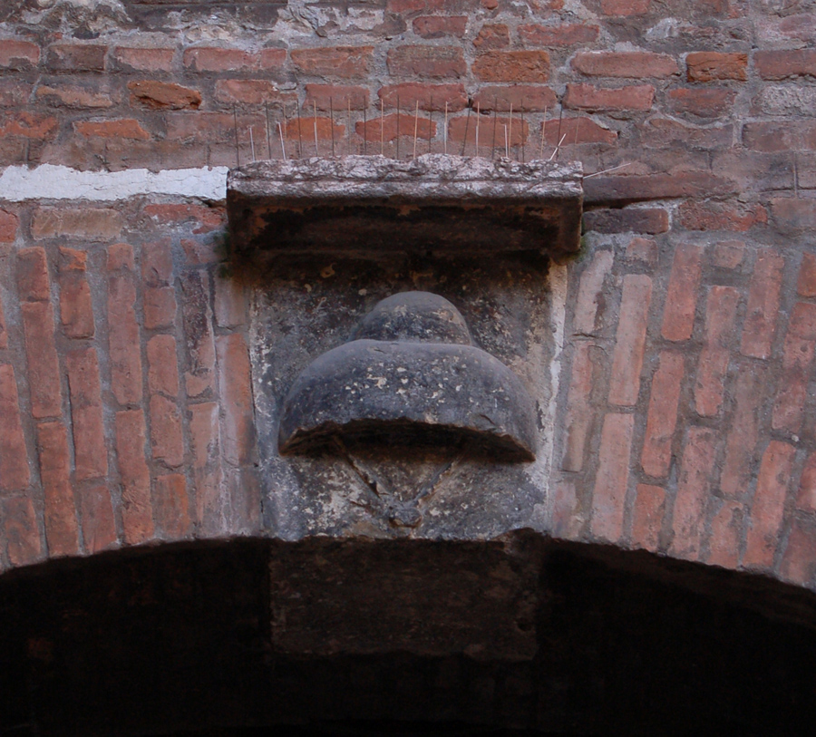 Effige posta sull'arco di entrata alla casa di Giulietta a Verona, lo stemma del cappello, della famiglia Cappelletti (da cui i Capuleti)